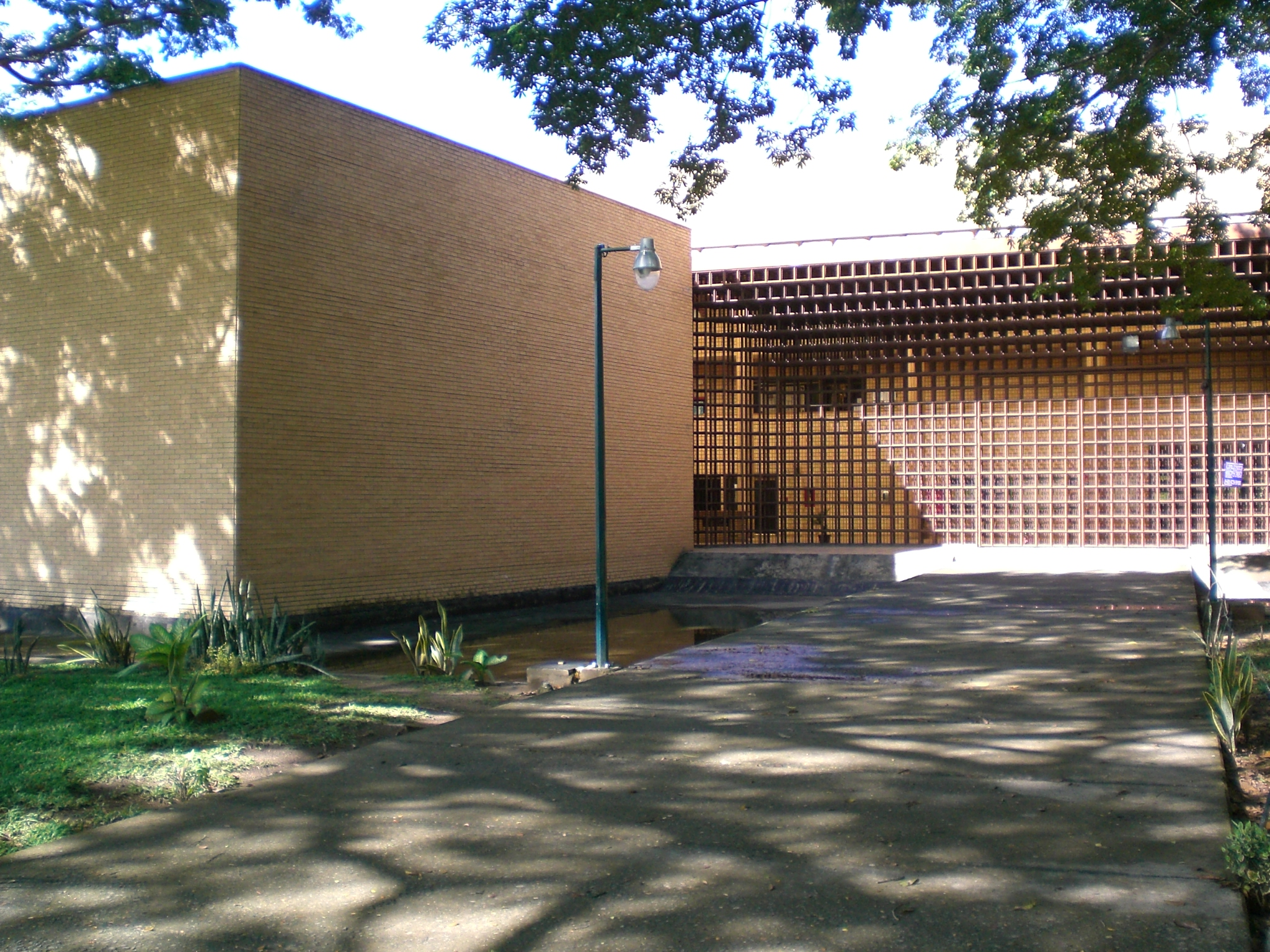 Tribunals of Ciudad Bolívar